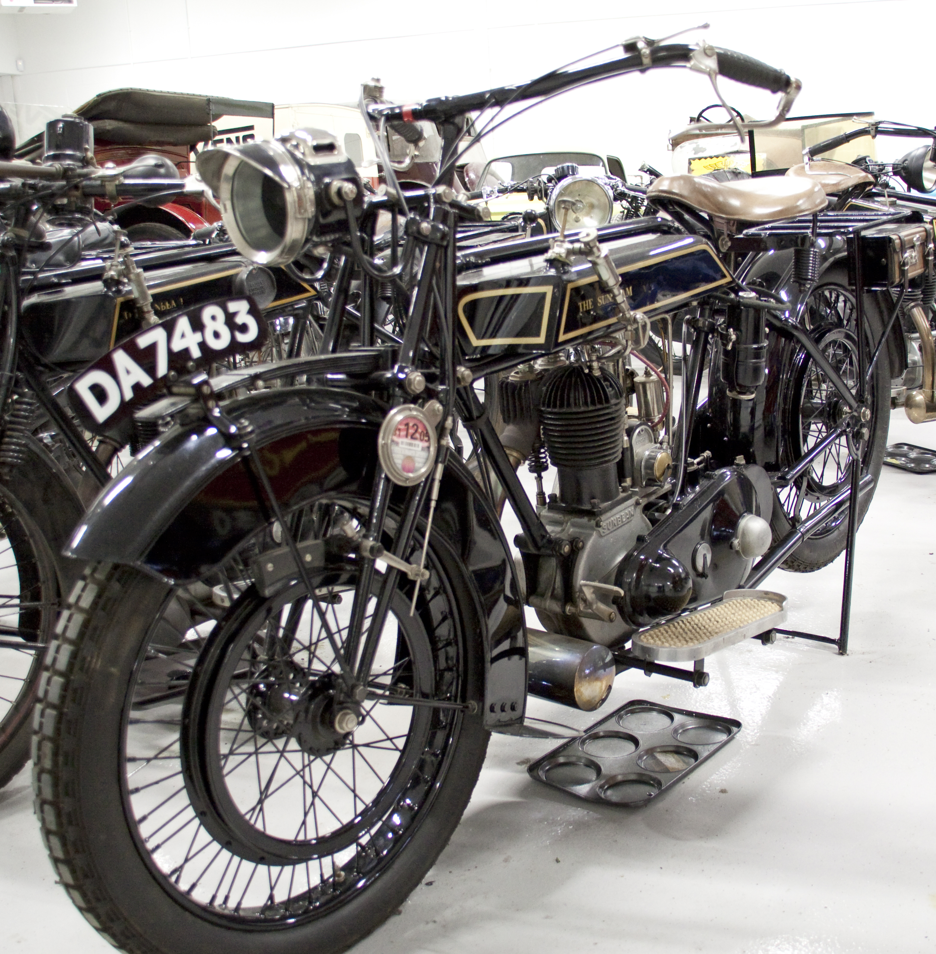 1923 Sunbeam 495cc side valve